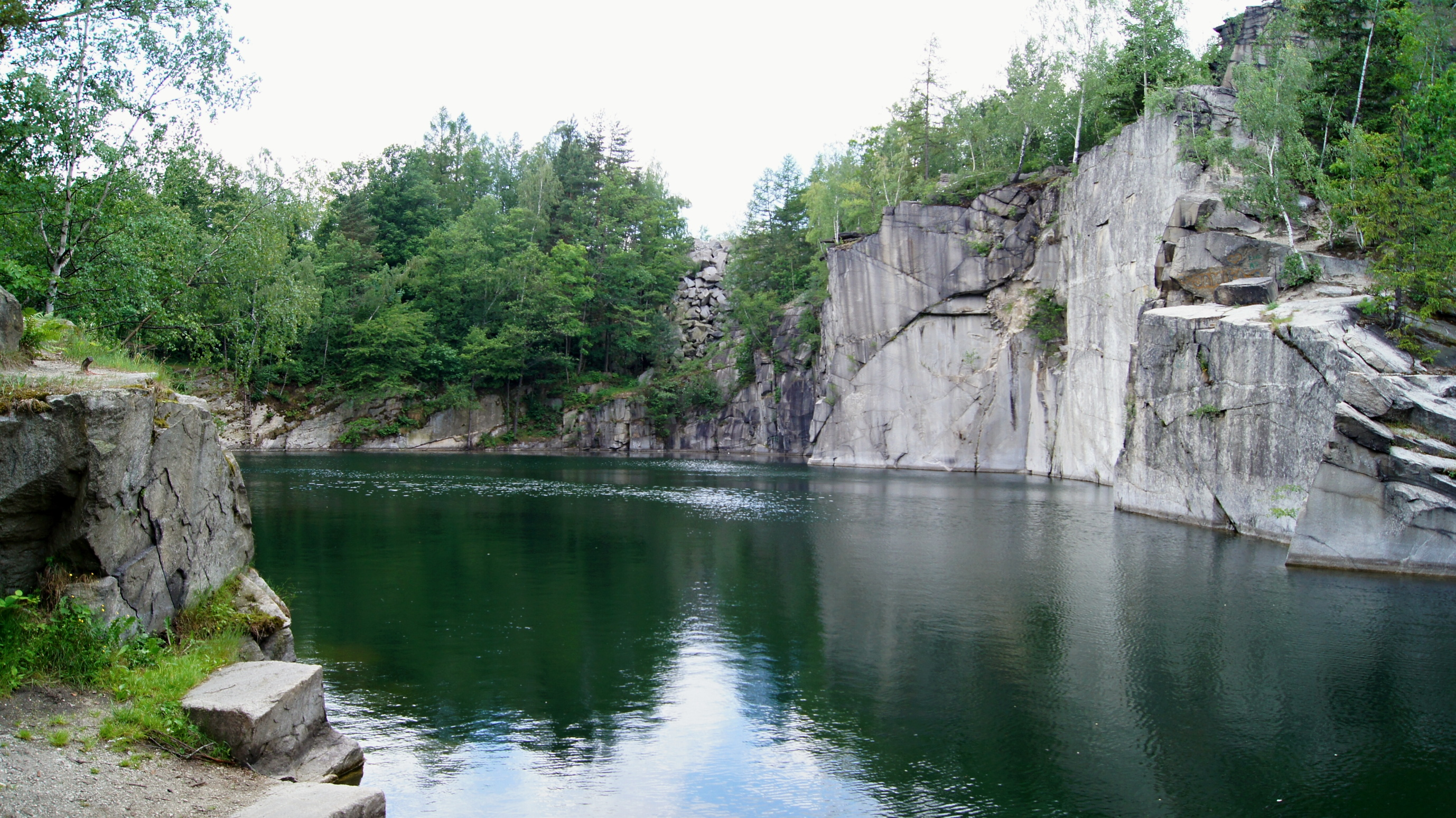 Rampa